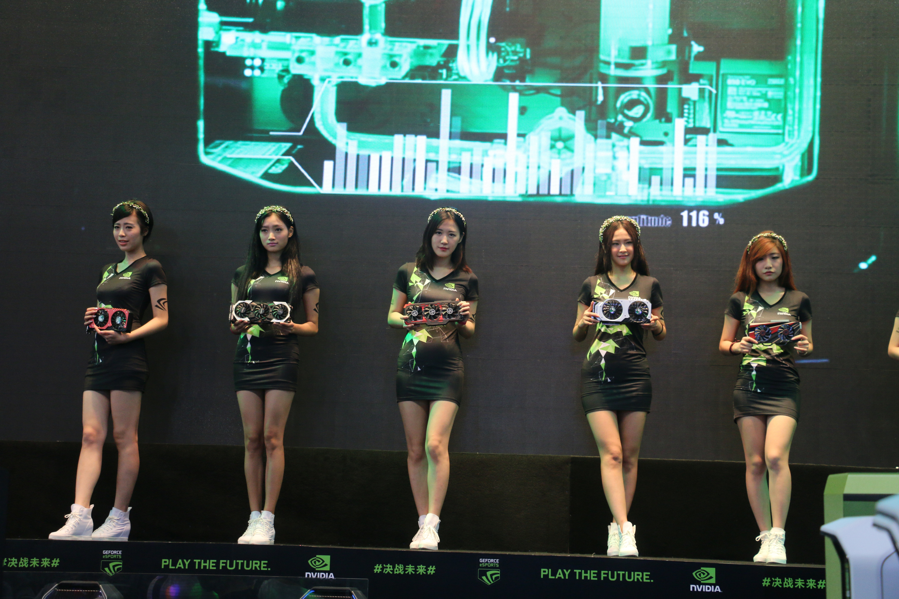 2015ChinaJoy SG美女 第一集。